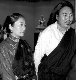 Karma Samdrup (à droite) et sa femme Dolkar Tso